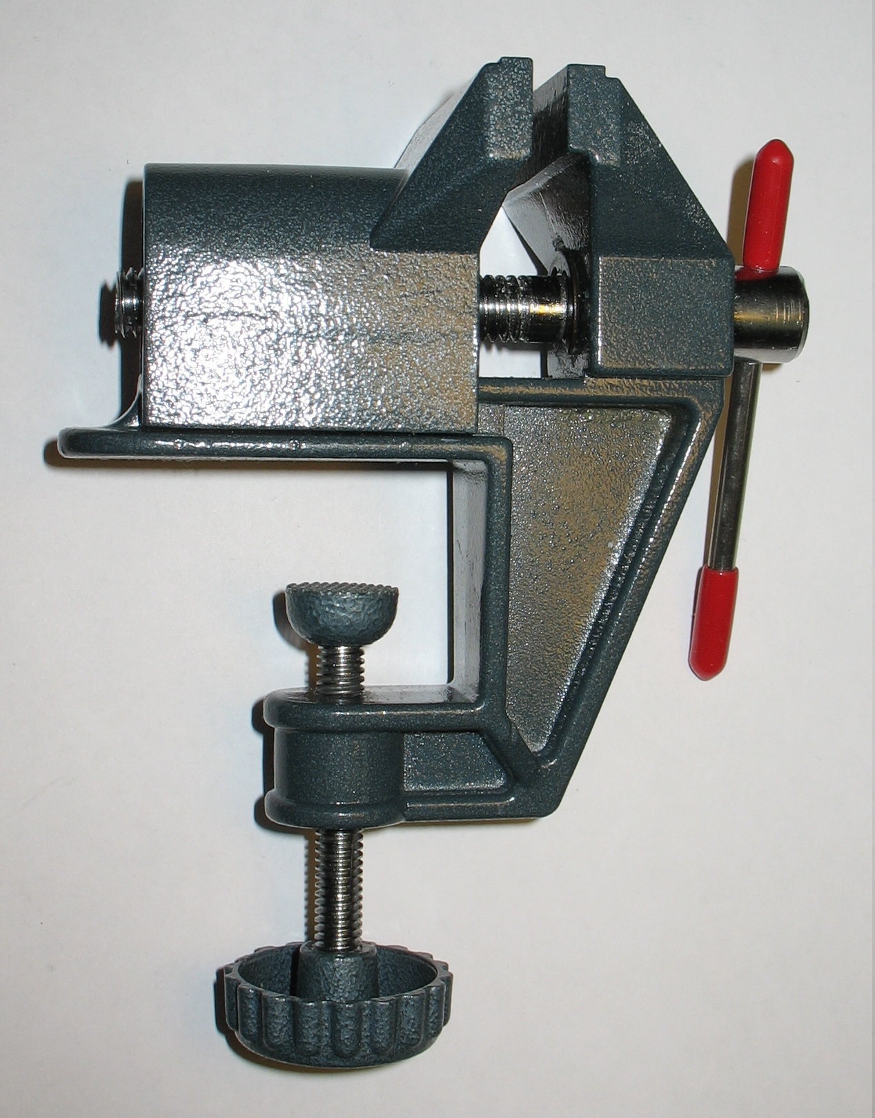 Небольшие слесарные тиски